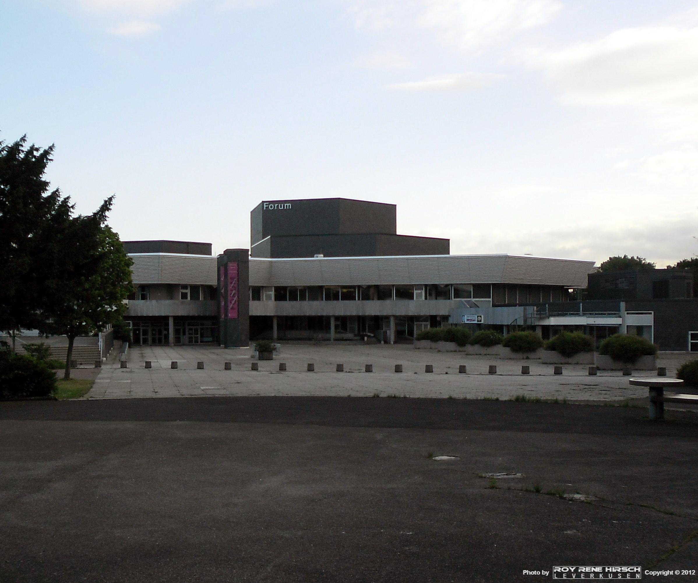 Baudenkmal: Leverkusen-Wiesdorf, Forum.